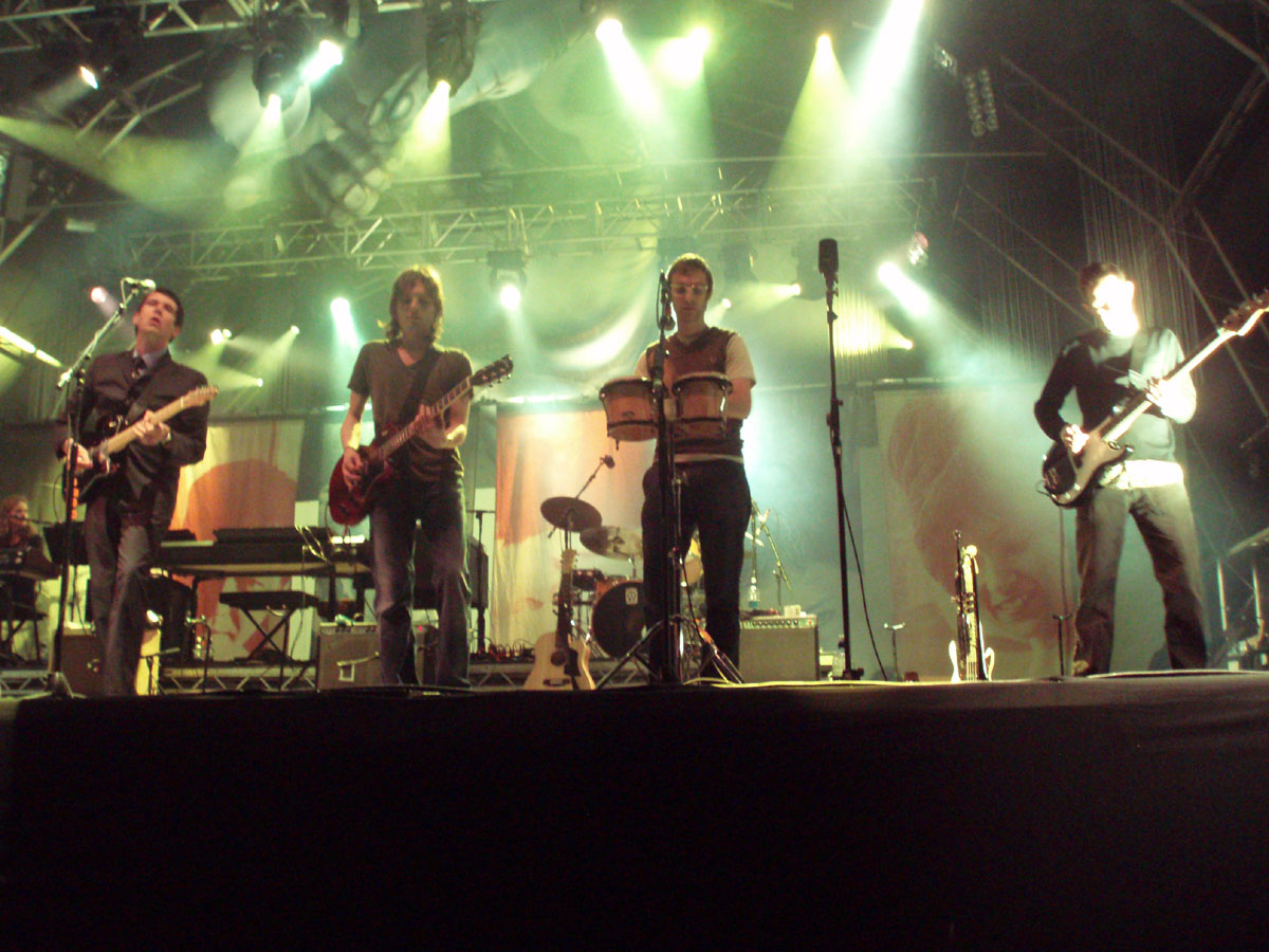 At Summer Sundae in Leicester, 13/08/06 (Sunday).